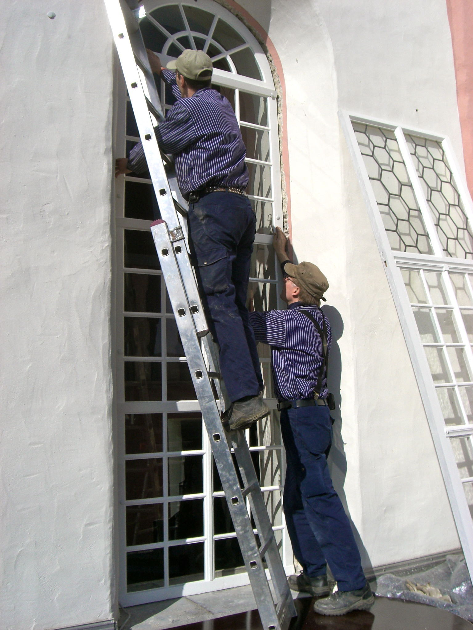 Fensterhandwerker bei der Arbeit an einer Kirche im Westerwald